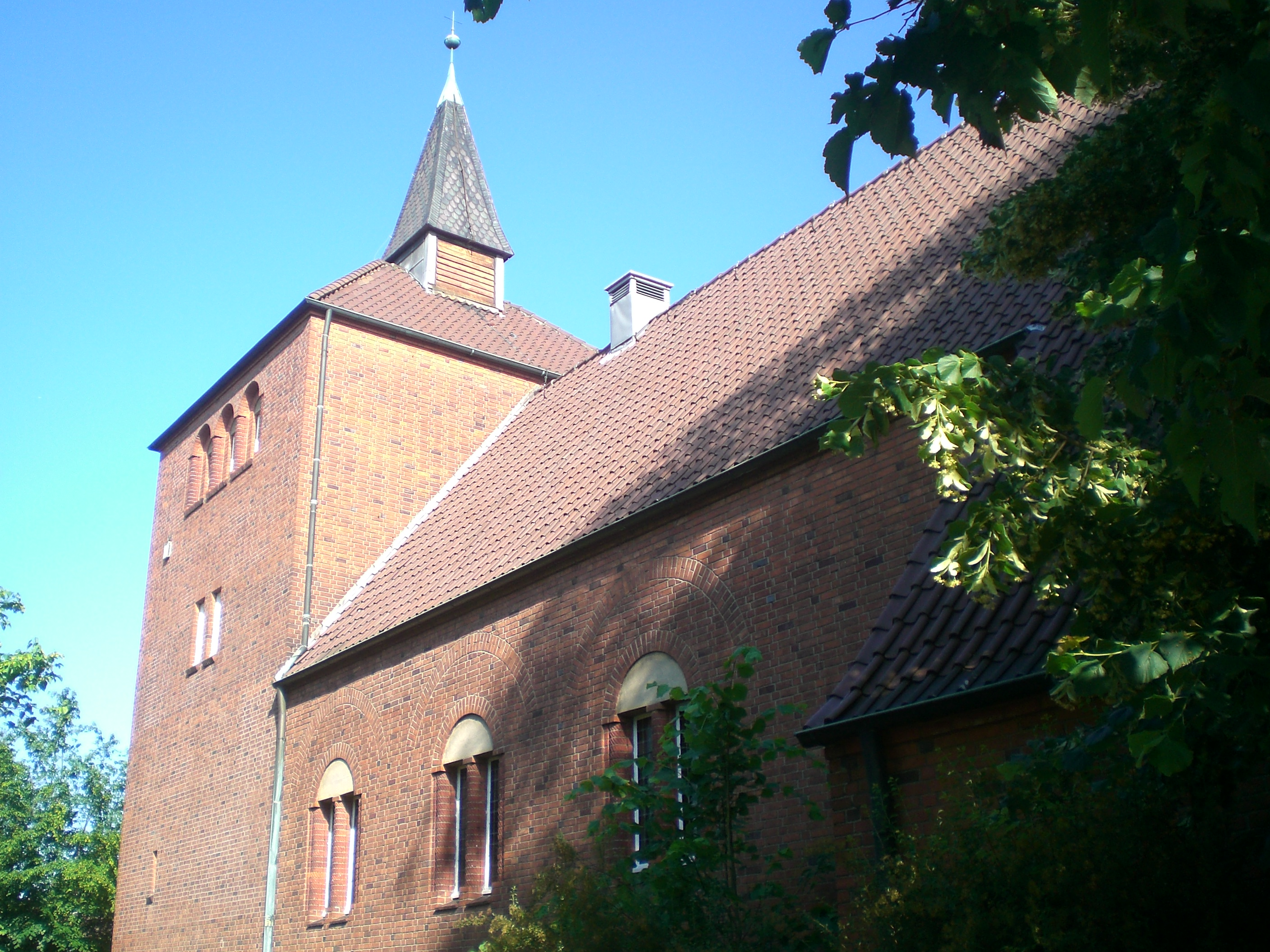 Evangelisch-lutherische Maria-Magdalenenen-Kirche in Hamburg-Ohlsdorf (Ortsteil Klein-Borstel).